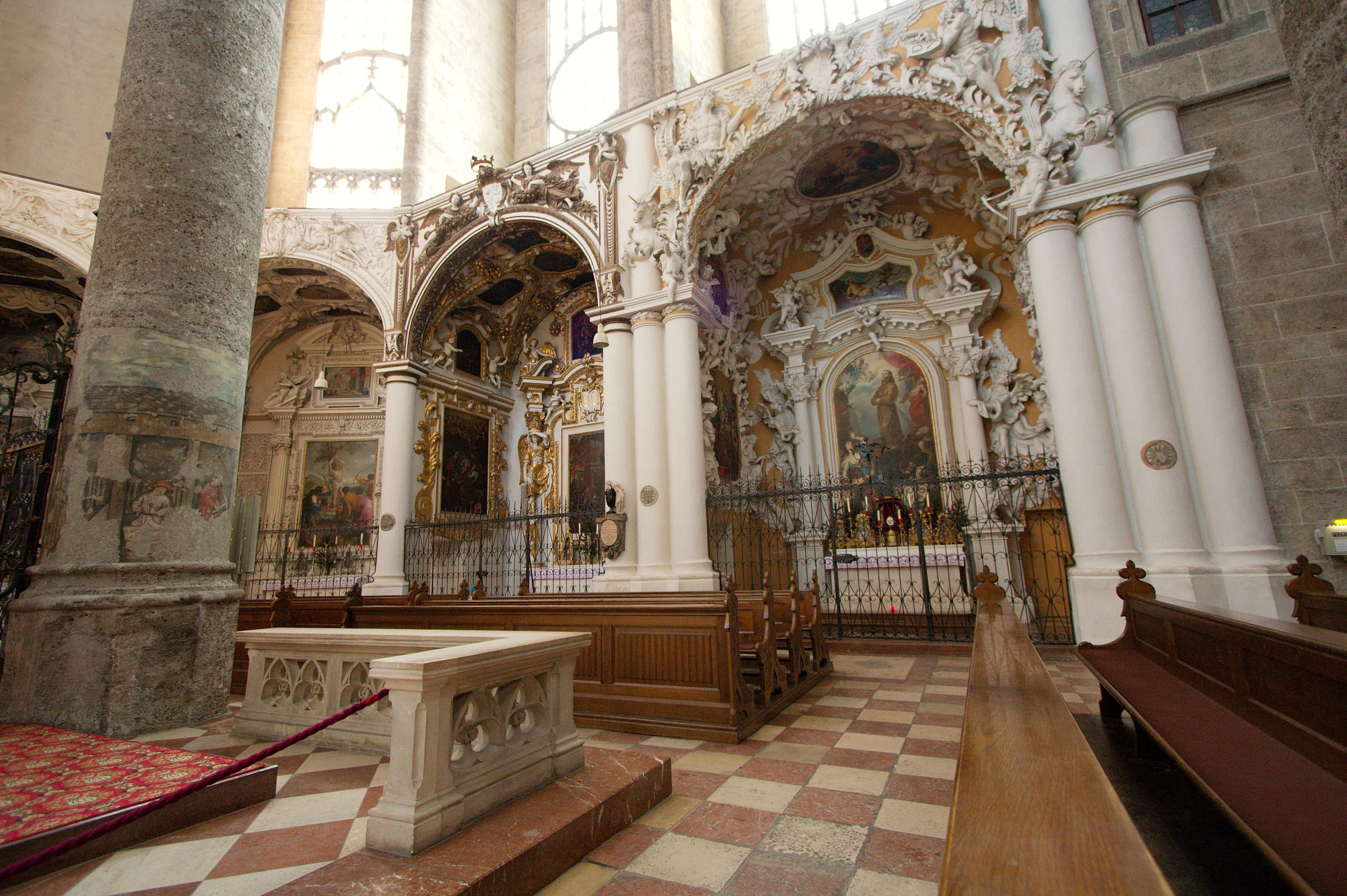 Franziskanerkirche Salzburg